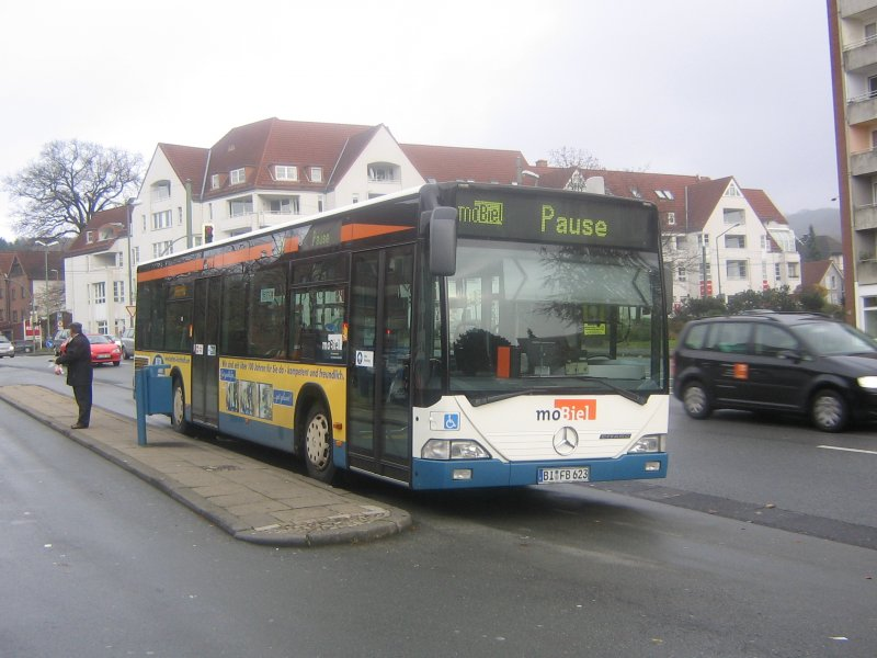 Mobiel Citaro